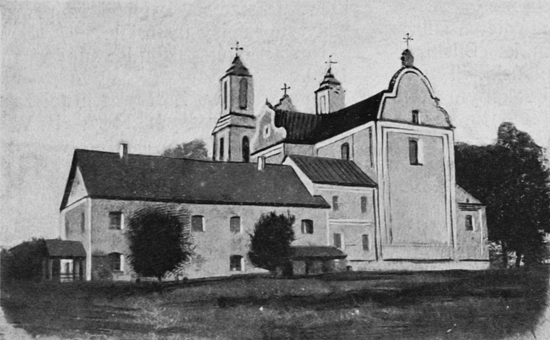 Беларуская (тарашкевіца): Губін (Hubin). Касьцёл і кляштар францішканаў